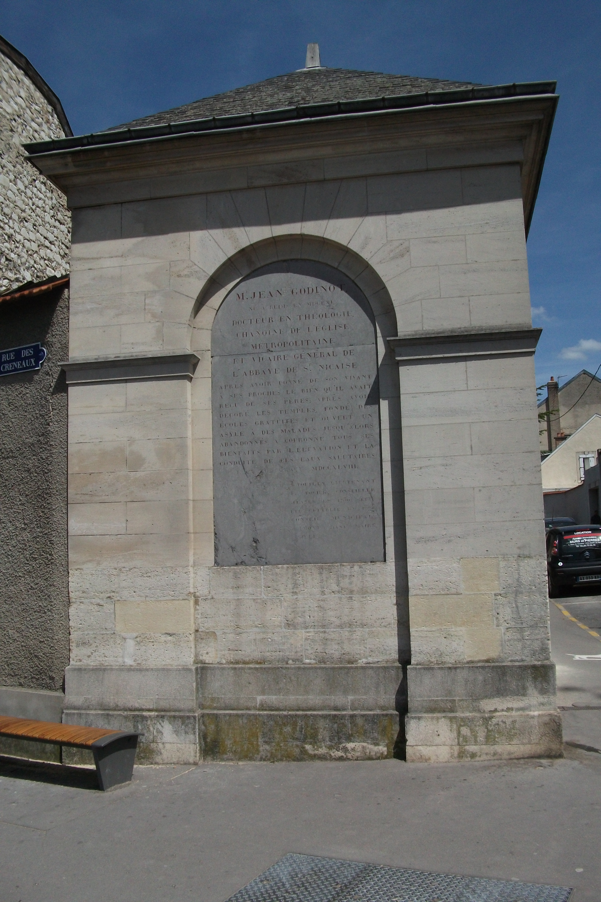 monument à l'angle de la Rue DIeu Lumière de Reims portant une dédicace en l'honneur du chanoine Jean Godinot.